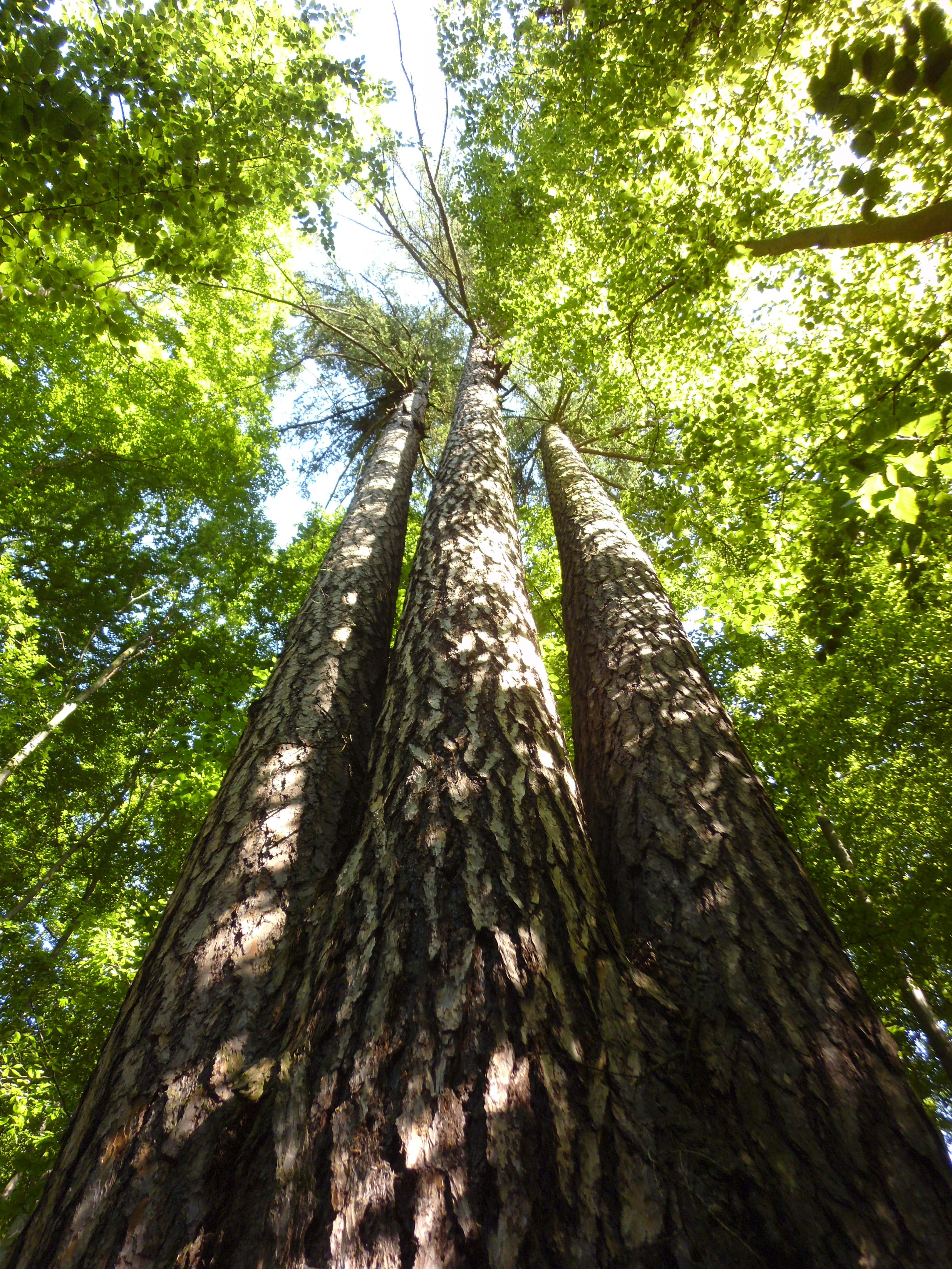 Troják u Habrůvky - kmeny